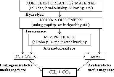 Čtyřfázový model anaerobní digesce; autor: Nordberg, překlad: Slejška, zdroj: Biom.cz